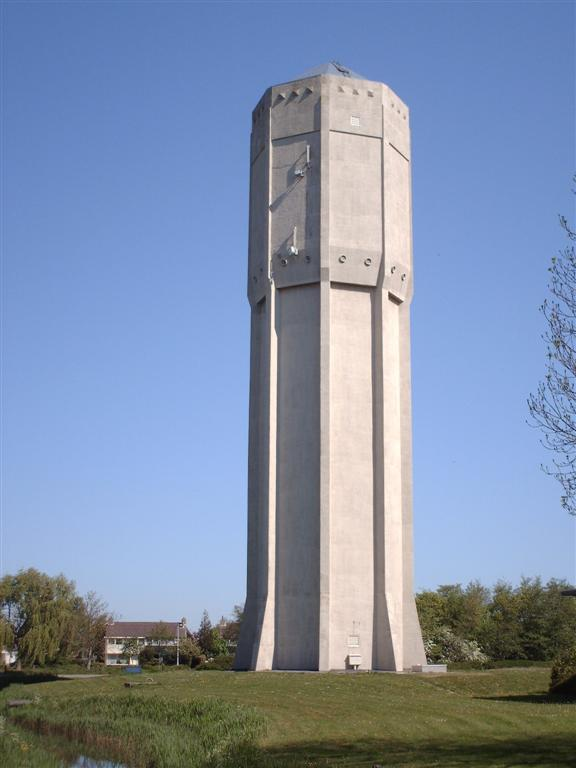 Watertoren Franeker